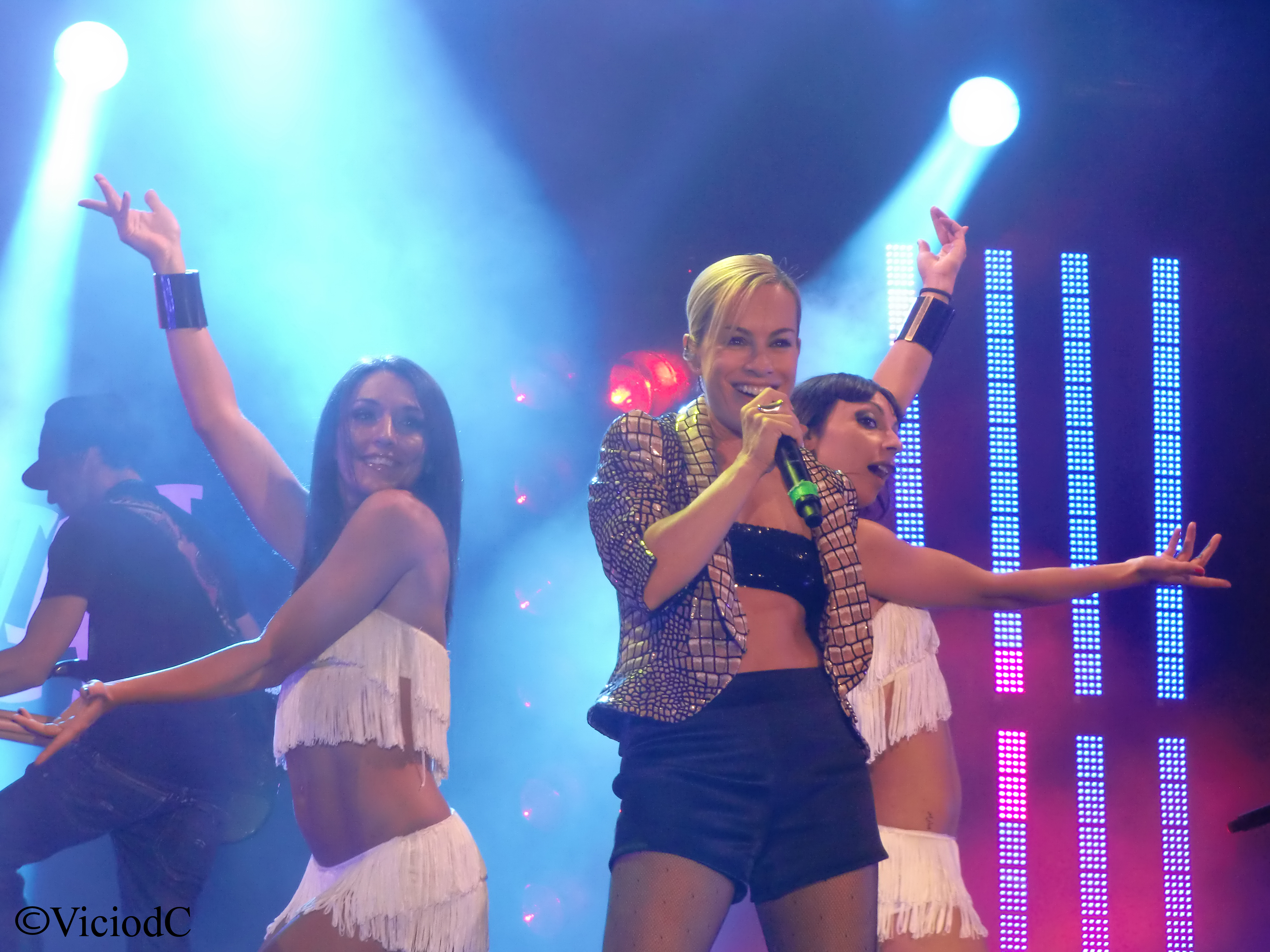 Alexia Live agosto 2010